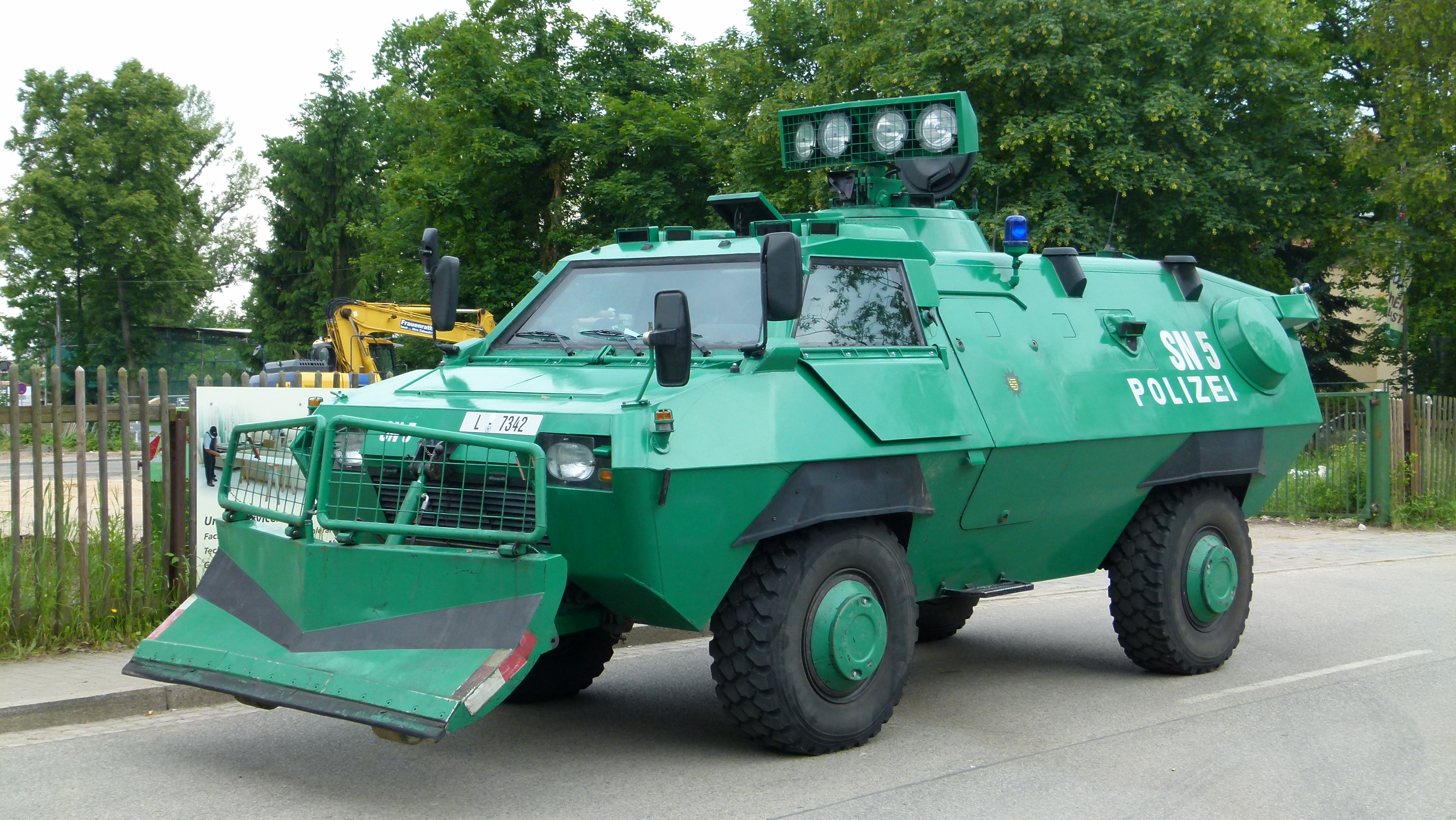 Polizei-Sonderfahrzeug bei der Bekämpfung des Elbe-Hochwassers in Dresden im Juni 2013